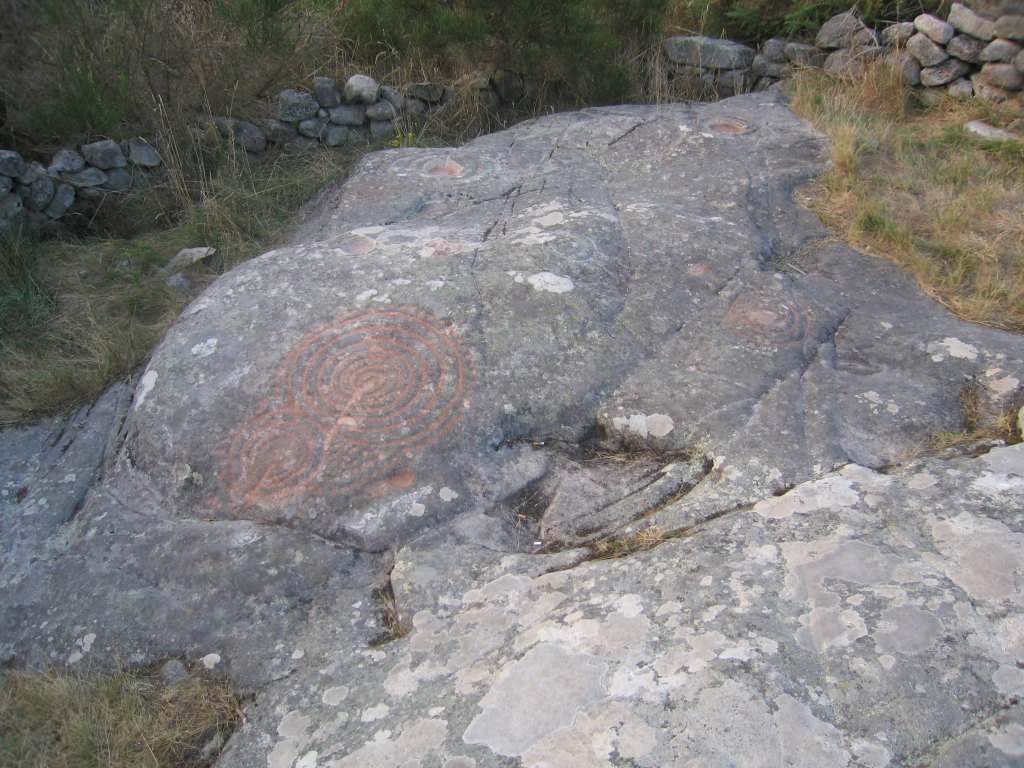 Laxe das Rodas en Louro, Muros